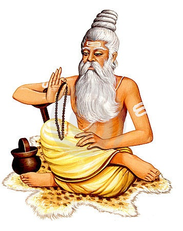 नेपाल भाषा: Ganpati guru